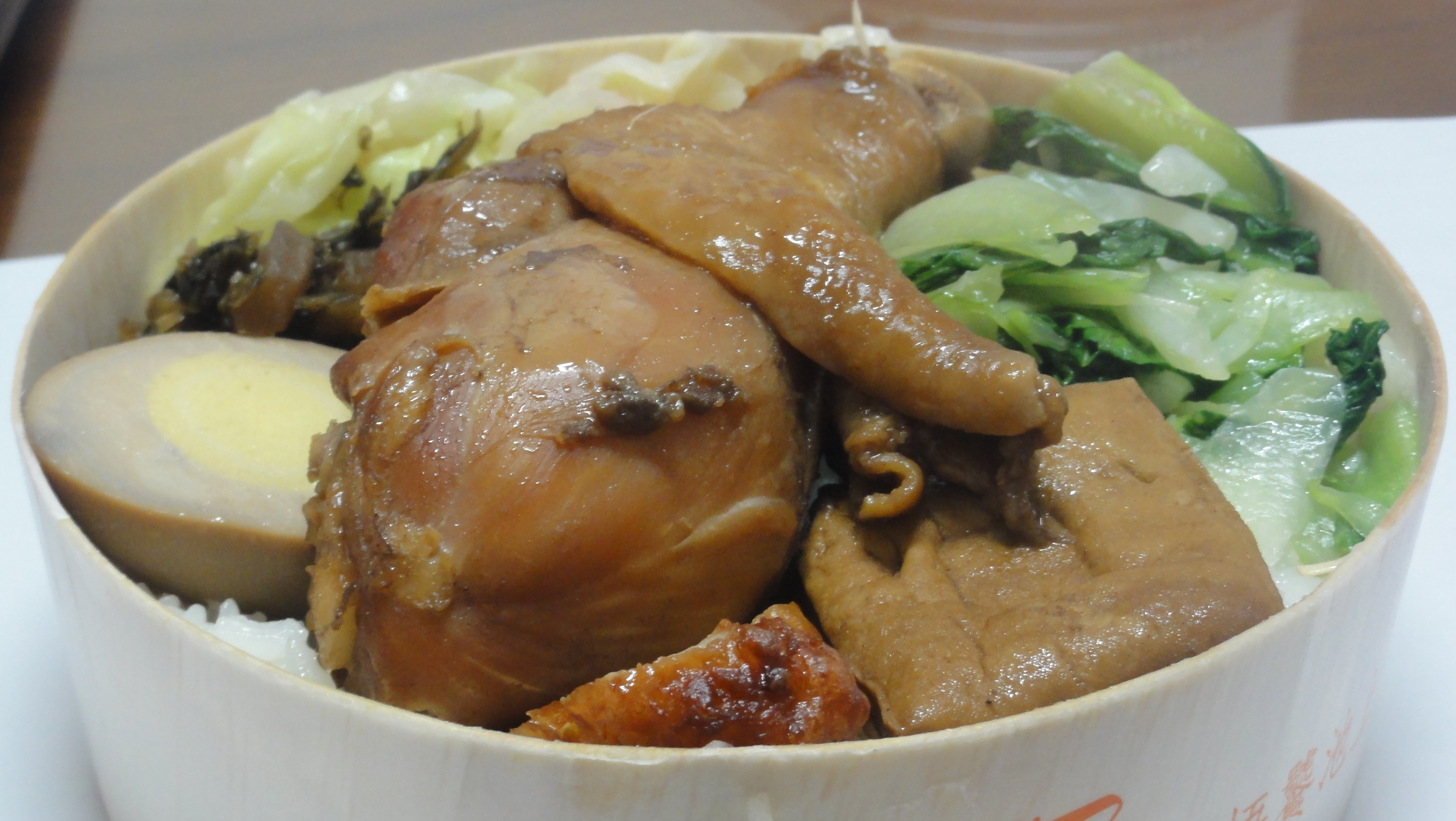 悟饕池上飯包販售的雞腿飯包。